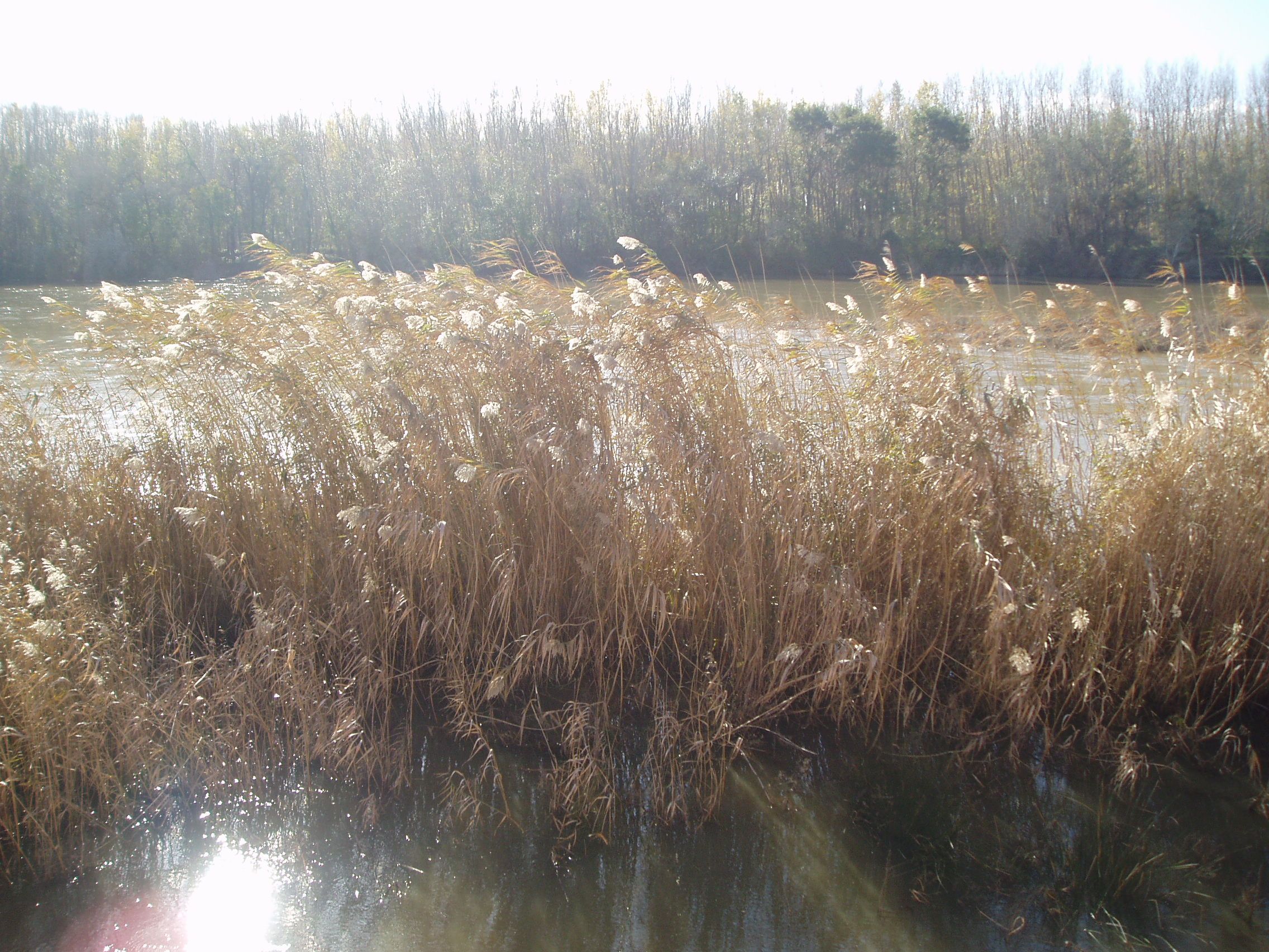 Rio Tajo a su paso por Talavera